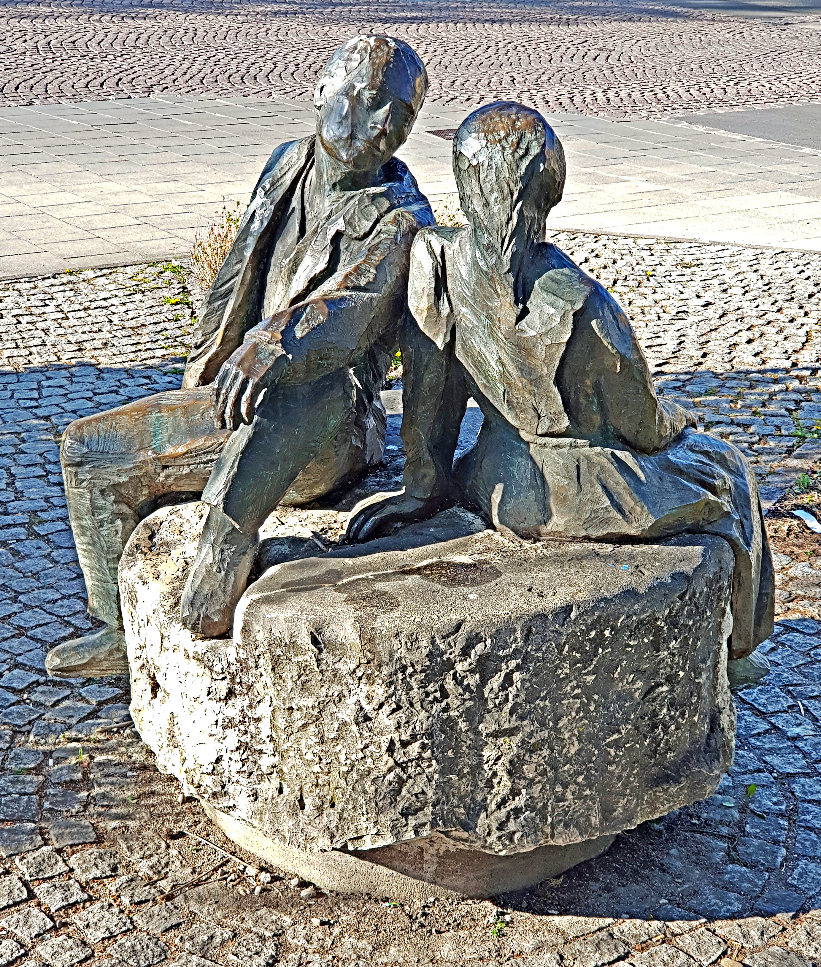 Skulptur "Begegnung" des Bildhauers Franz Hämmerle aus dem Jahre 1993 am Grünen Markt in Puchheim